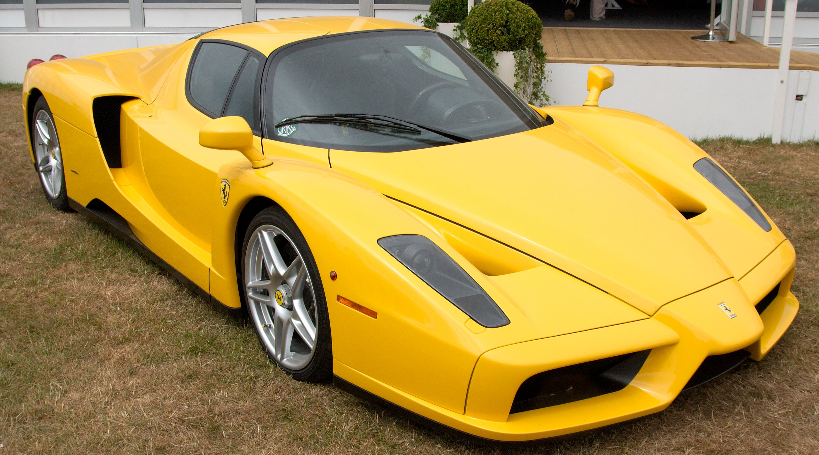 Ferrari Enzo